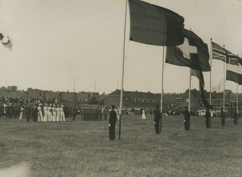 De vlaggenparade van de 21e Vierdaagse op het Molenveld.